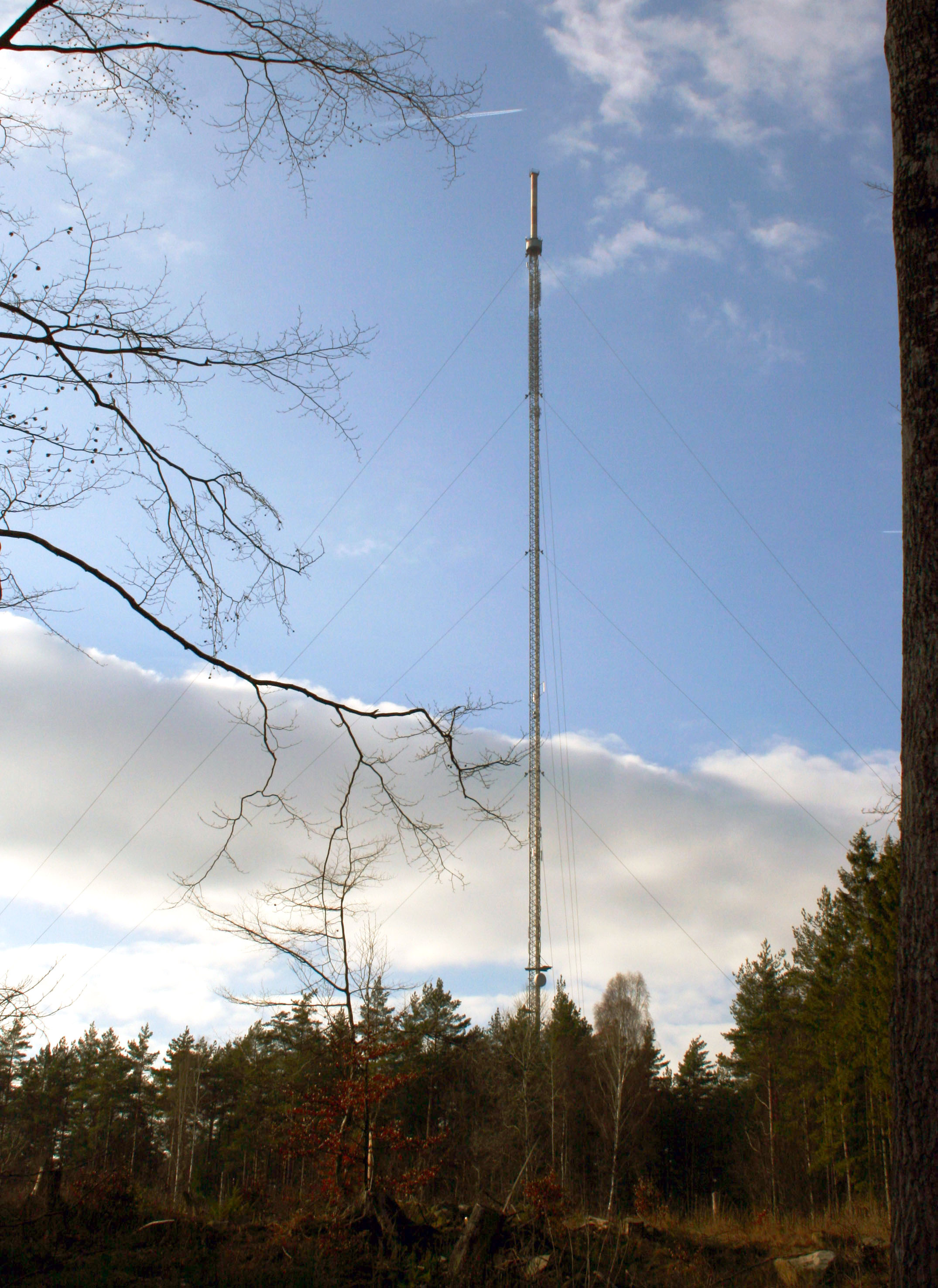 Gungvalamasten i Gungvala, Karlshamns kommun